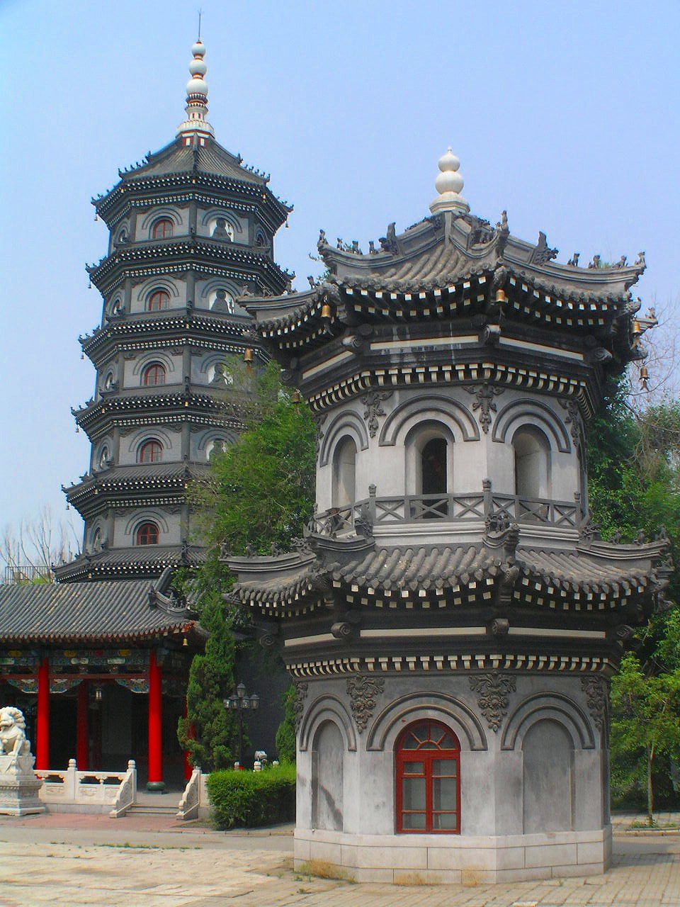 ハルビンの仏教文化の中心的な寺院。文廟の近く。1924年に建設された東北三省の4古刹のひとつ。